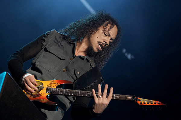 Kirk Hammett — Vienna 2007